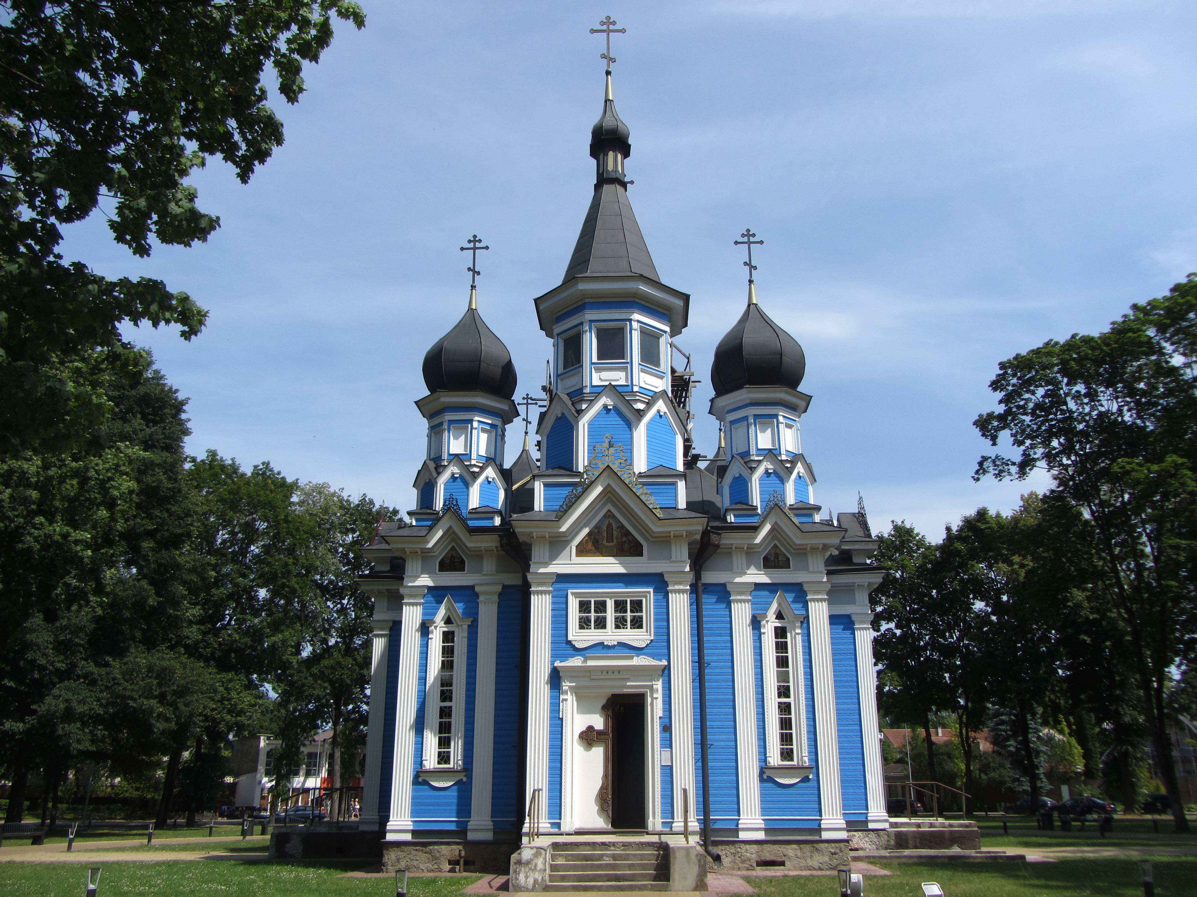 Druskininkai, Lithuania